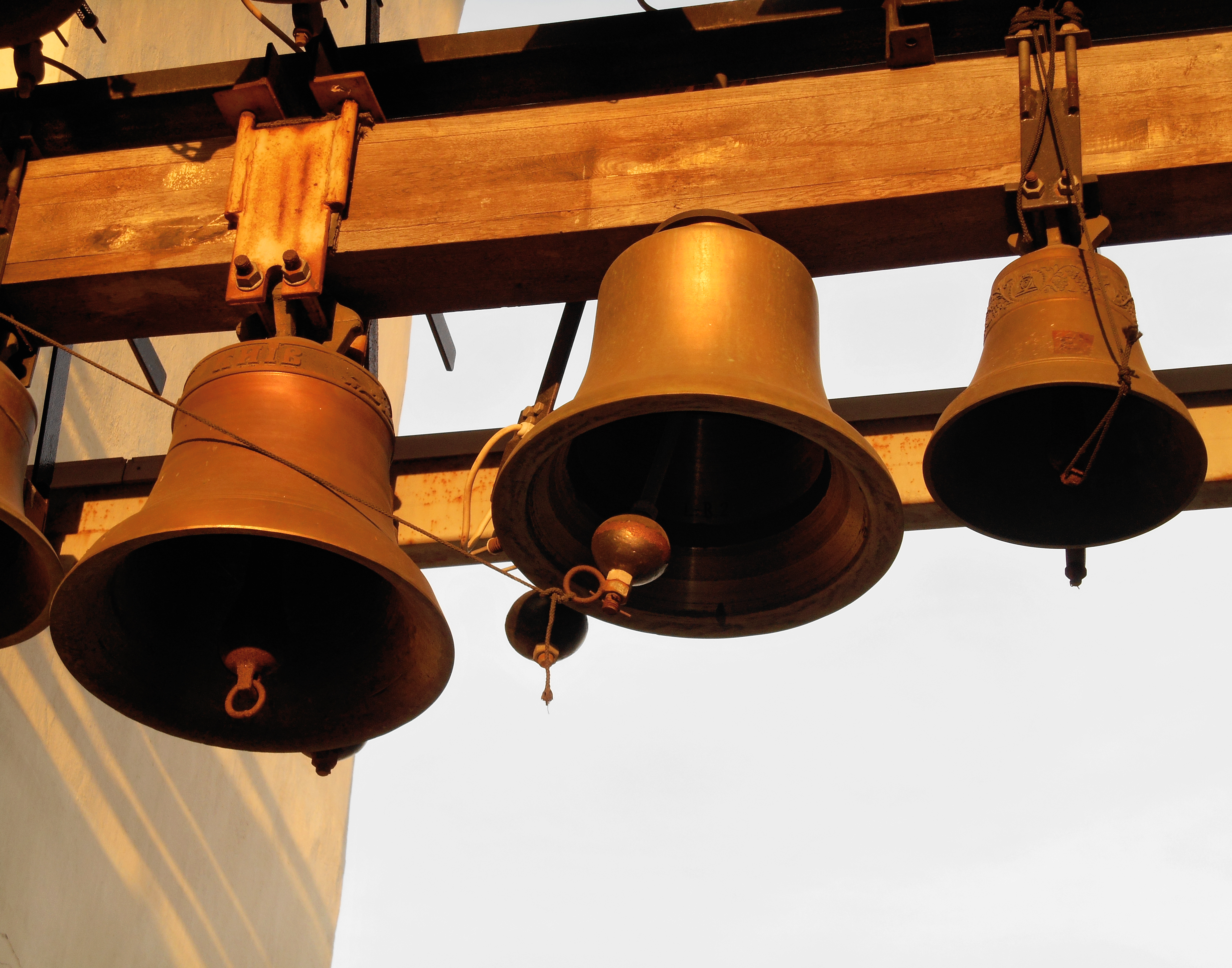 Собор Софійський, Київ, Володимирська вул., 24